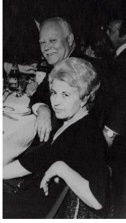 fotografía de Guillermo Cabanellas de Torres y Carmen C. de Cabanellas